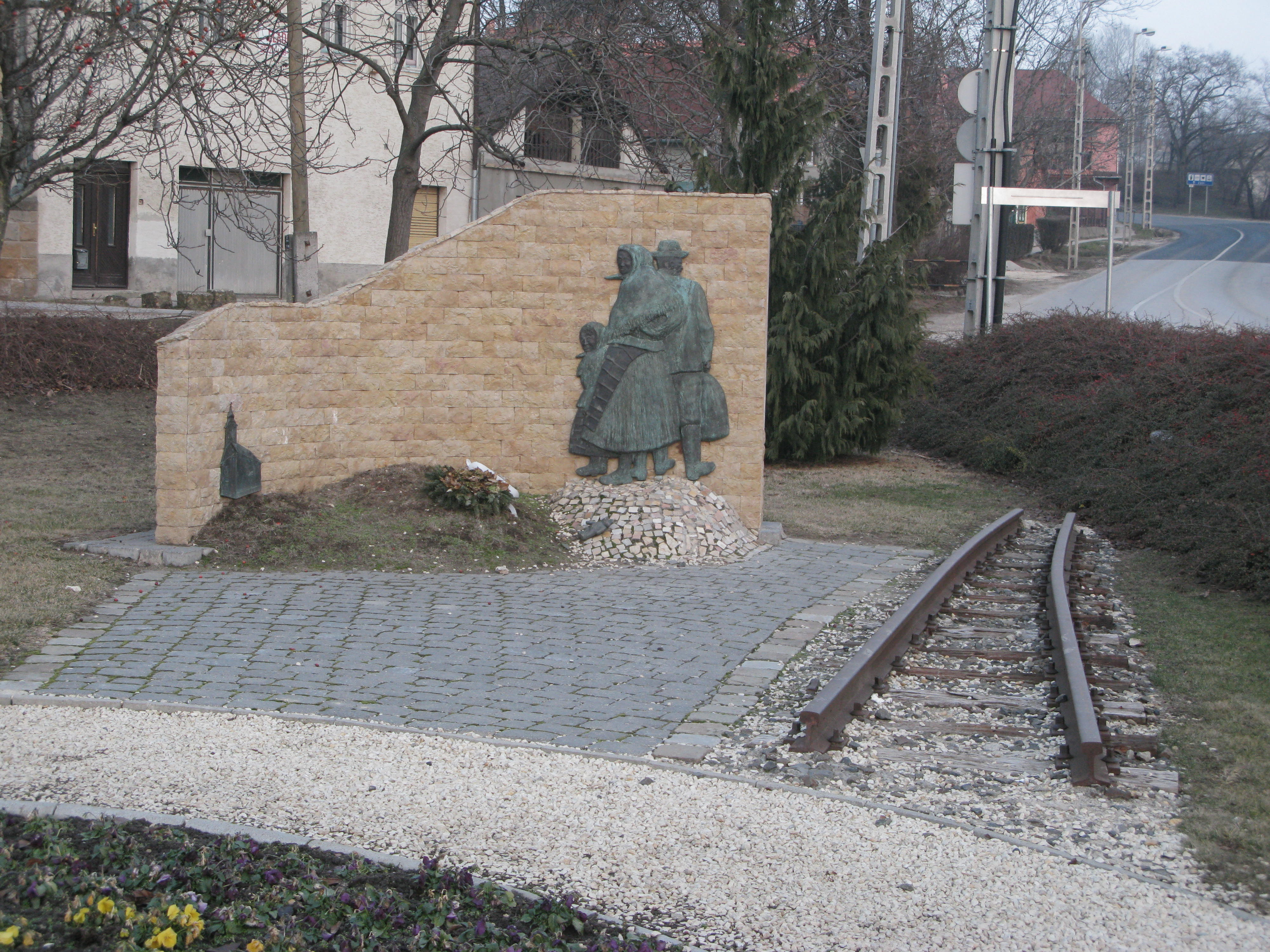 Törökbálinti kitelepítettek emlékműve (Kozák Attila, 2006). - Pest megye, Törökbálint Sváb tér.